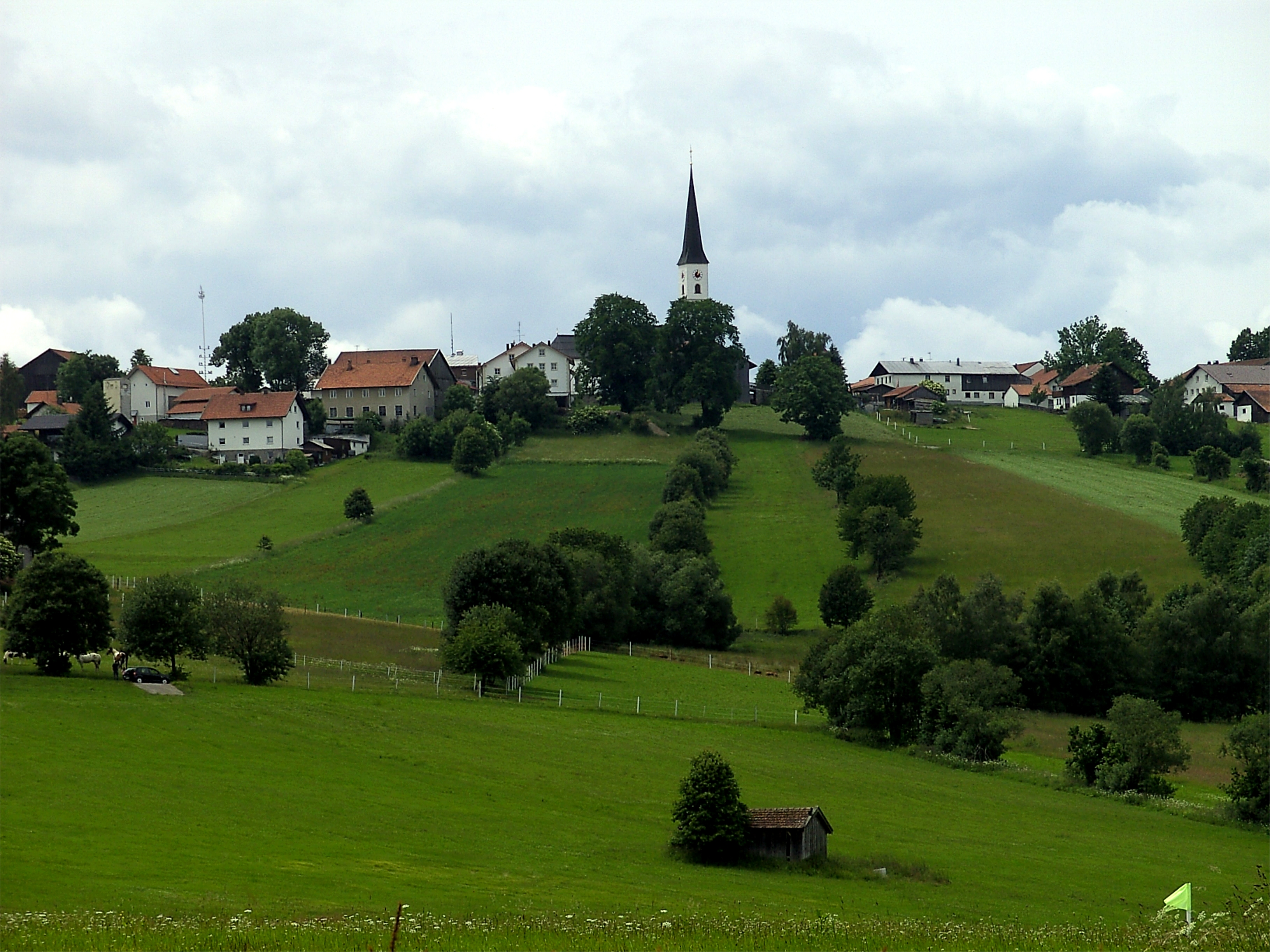 Kreuzberg, ein Dorf in der Gemeinde der Stadt Freyung im Landkreis Freyung-Grafenau.